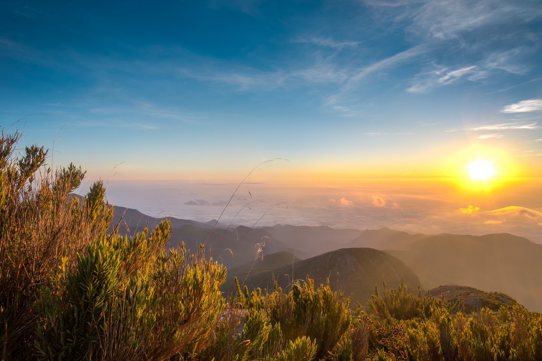 Um dos nascer do sol mais lindos do Brasil!